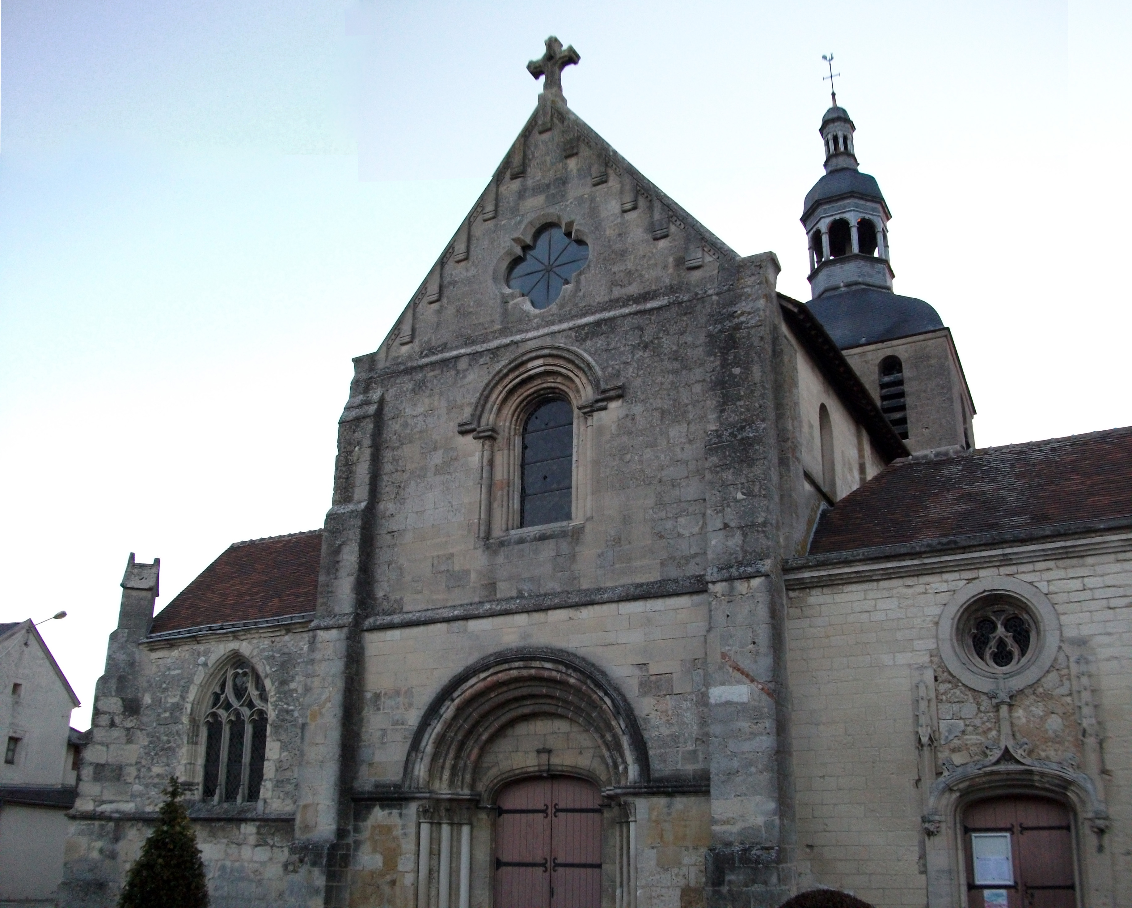 Église Sainte-Macre de Fismes .